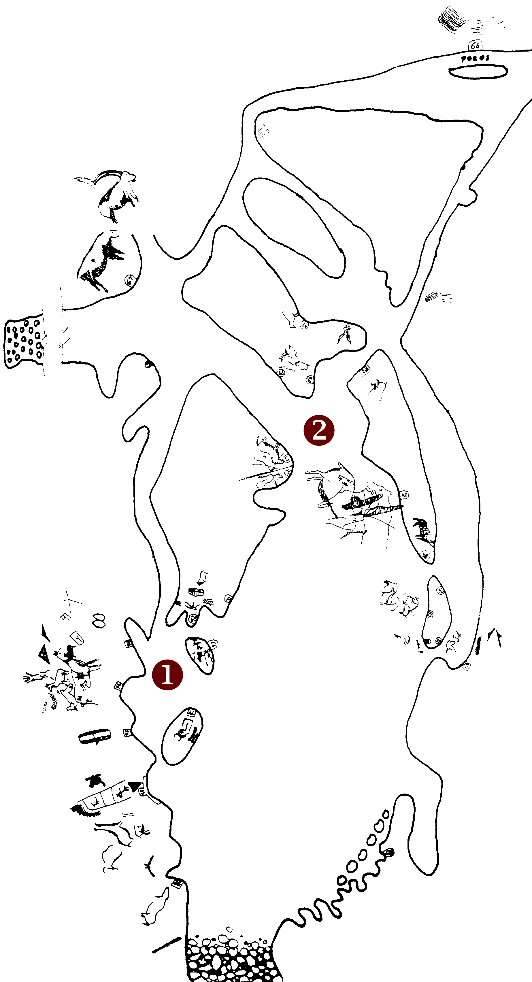 Plano de la Galería C (tercer santuario) de la Cueva de La Pasiega, en el monte Castillo, localidad de Puente Viesgo (Cantabria, España)